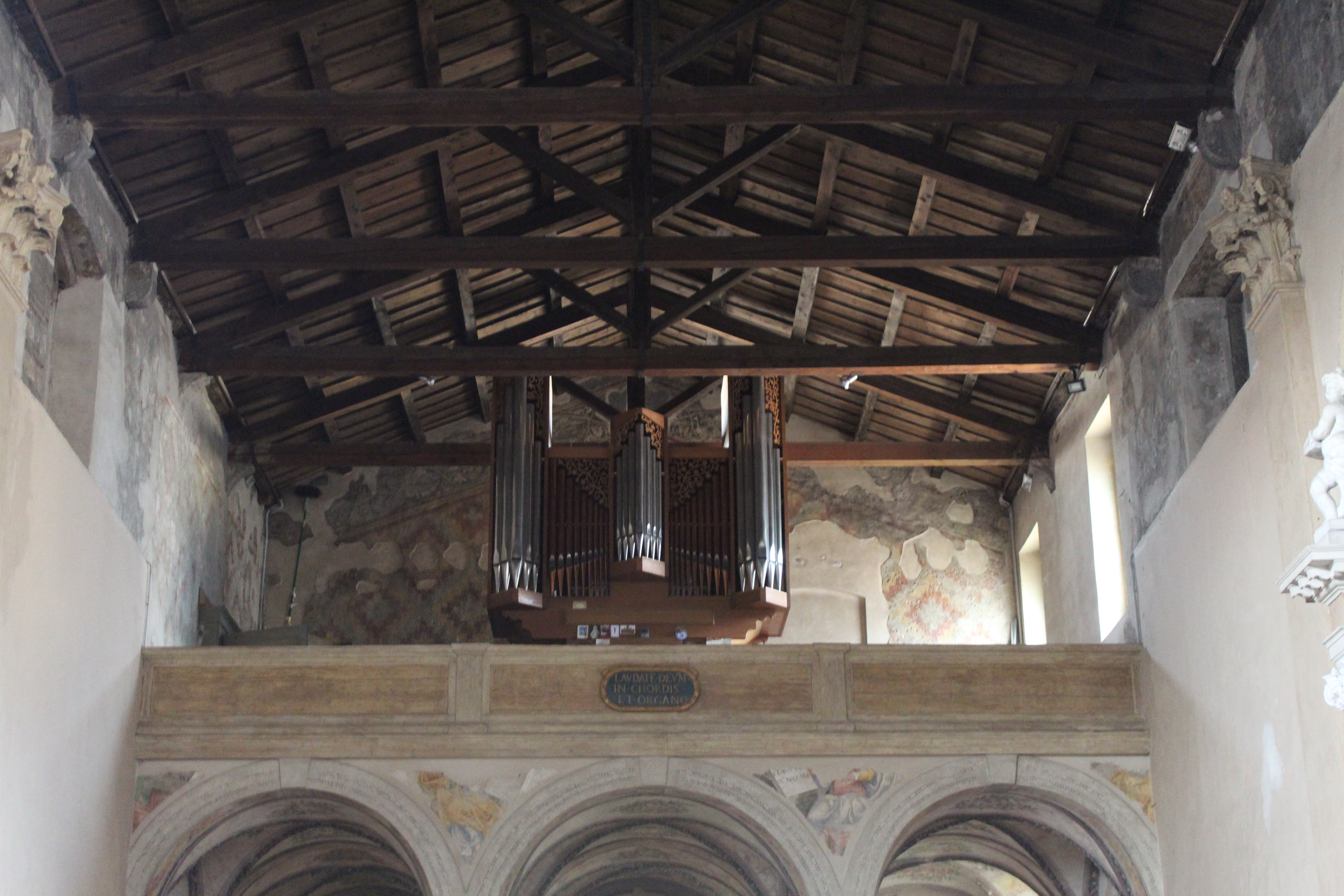 Chiesa della Santissima Trinità in Monte Oliveto a Verona